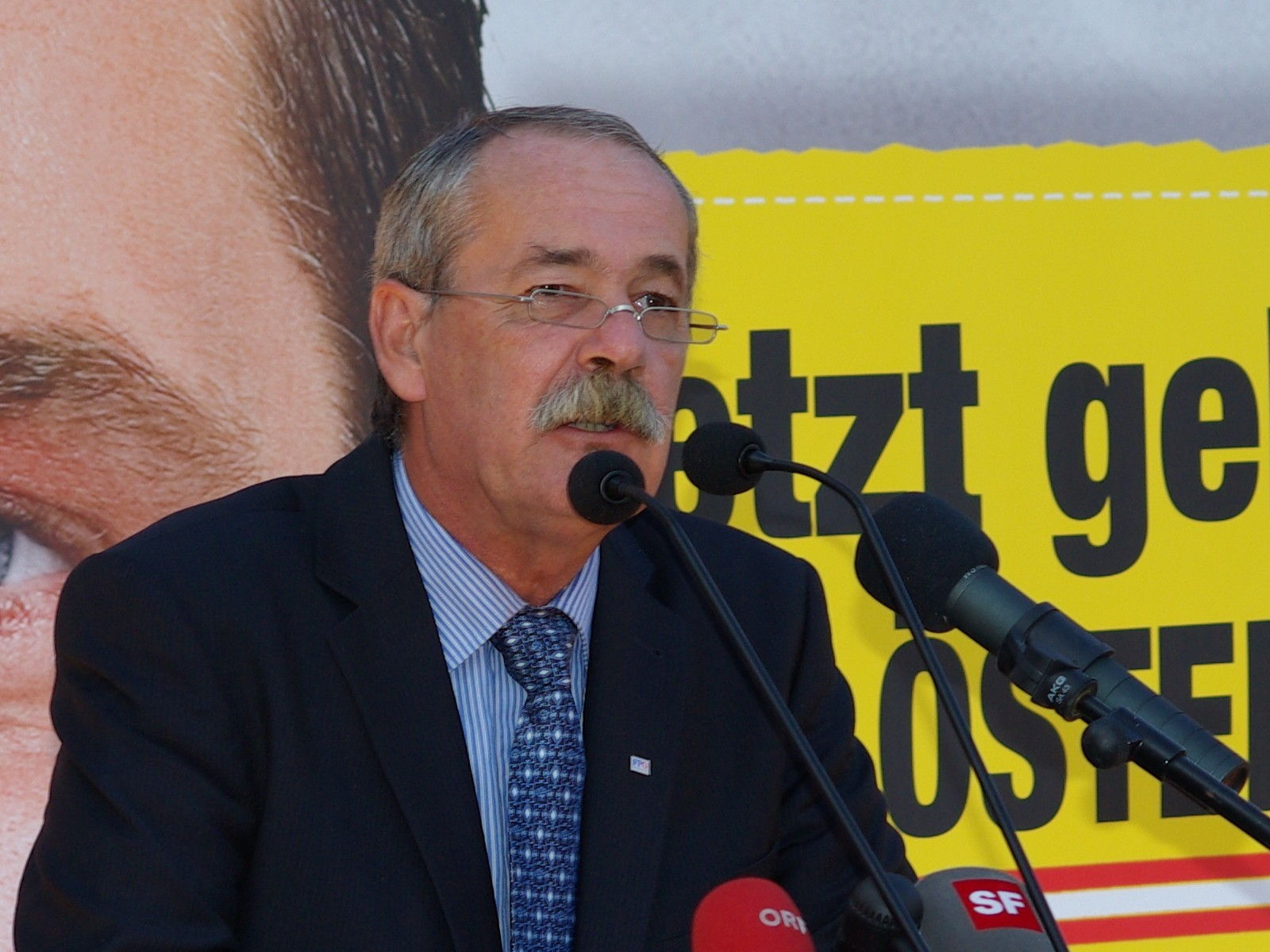 Der österreichische Politiker Erich Königsberger bei einer Wahlkampfveranstaltung der FPÖ am 18. September 2008 in Sankt Pölten.